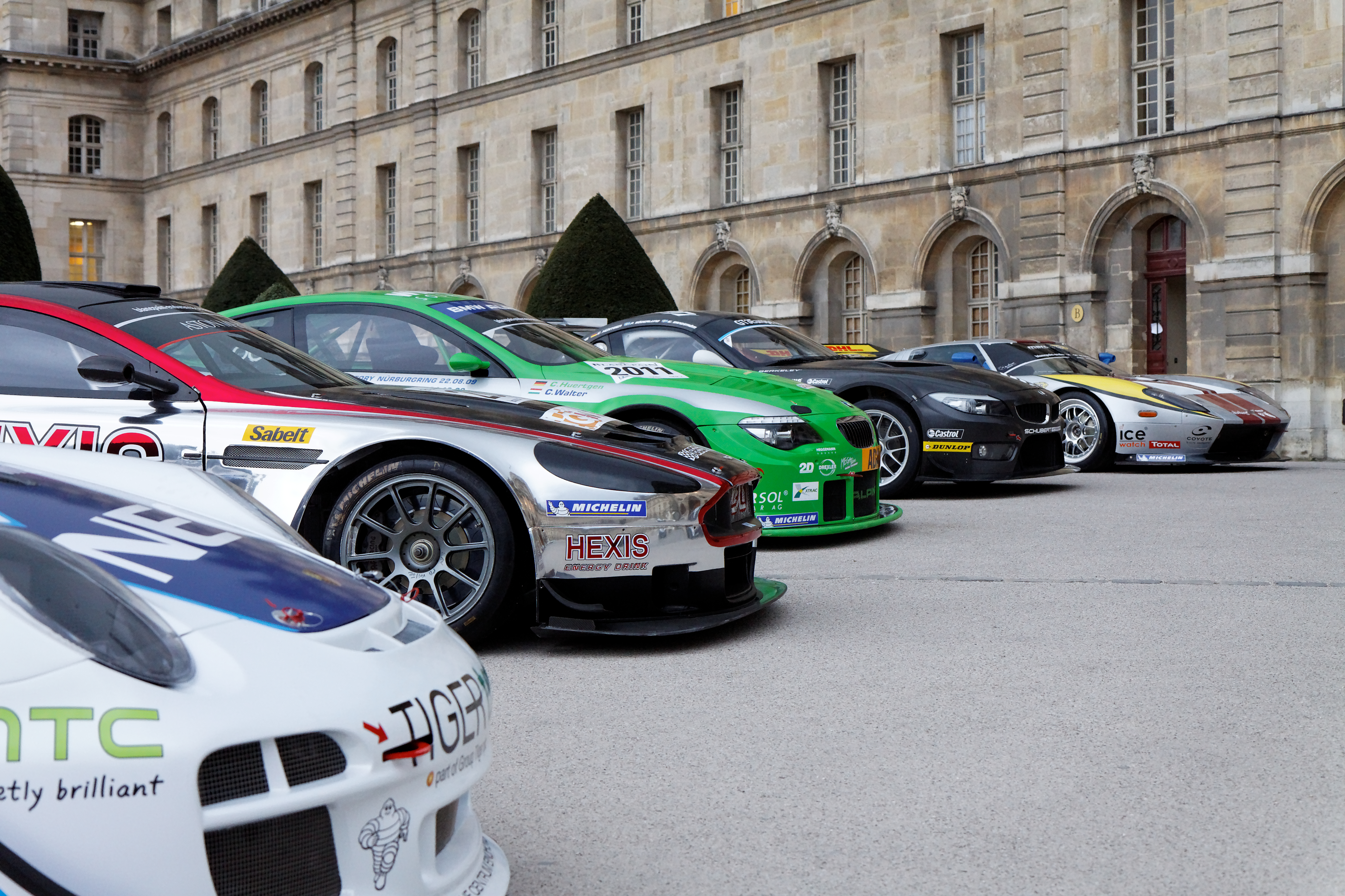 Photographie prise lors de la présentation du Blancpain Endurance series aux Invalides à Paris en mars 2011.